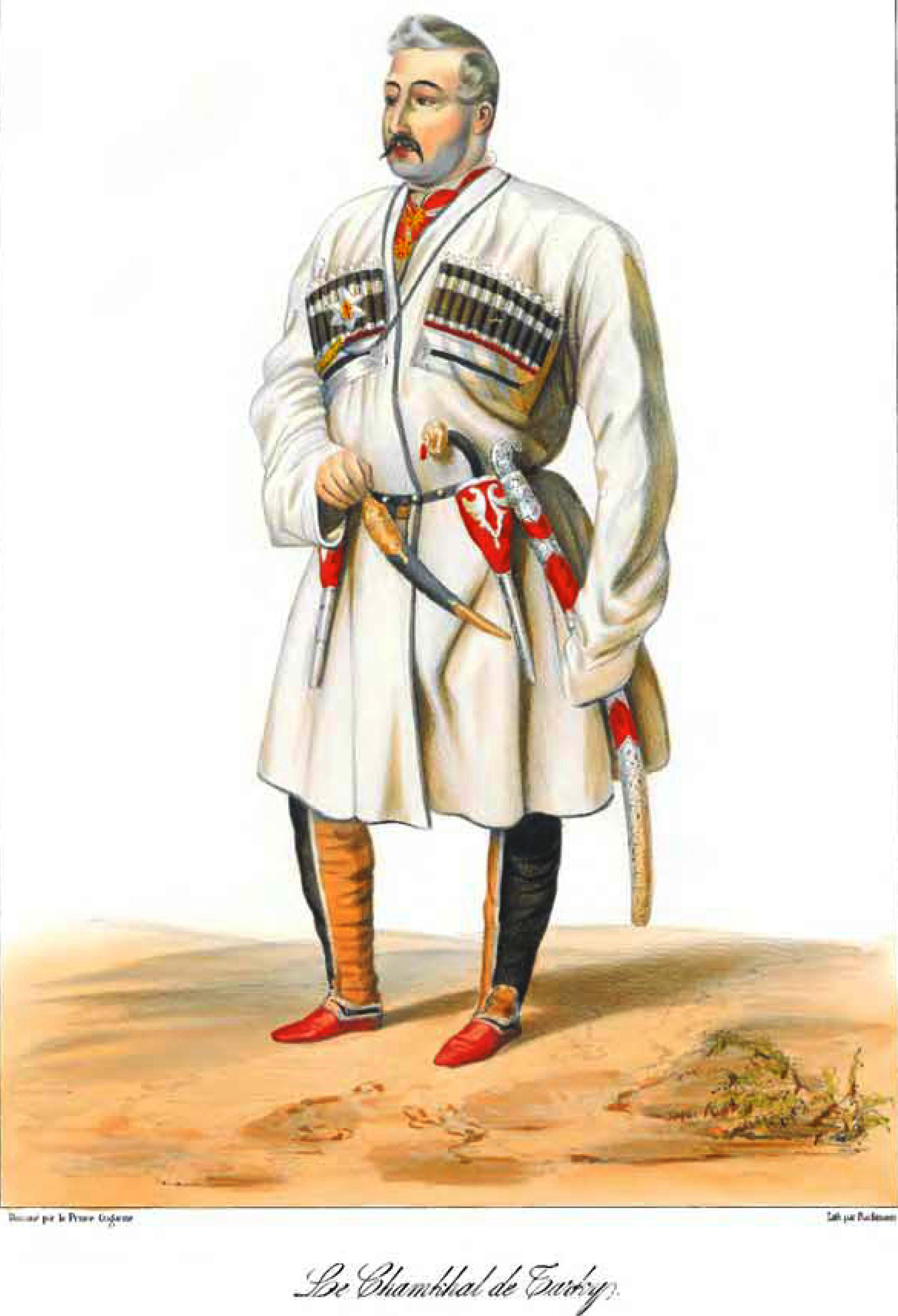 Scènes, paysages, moeurs et costumes du Caucase dessinés d'aprés nature par le prince G. Gagarine.